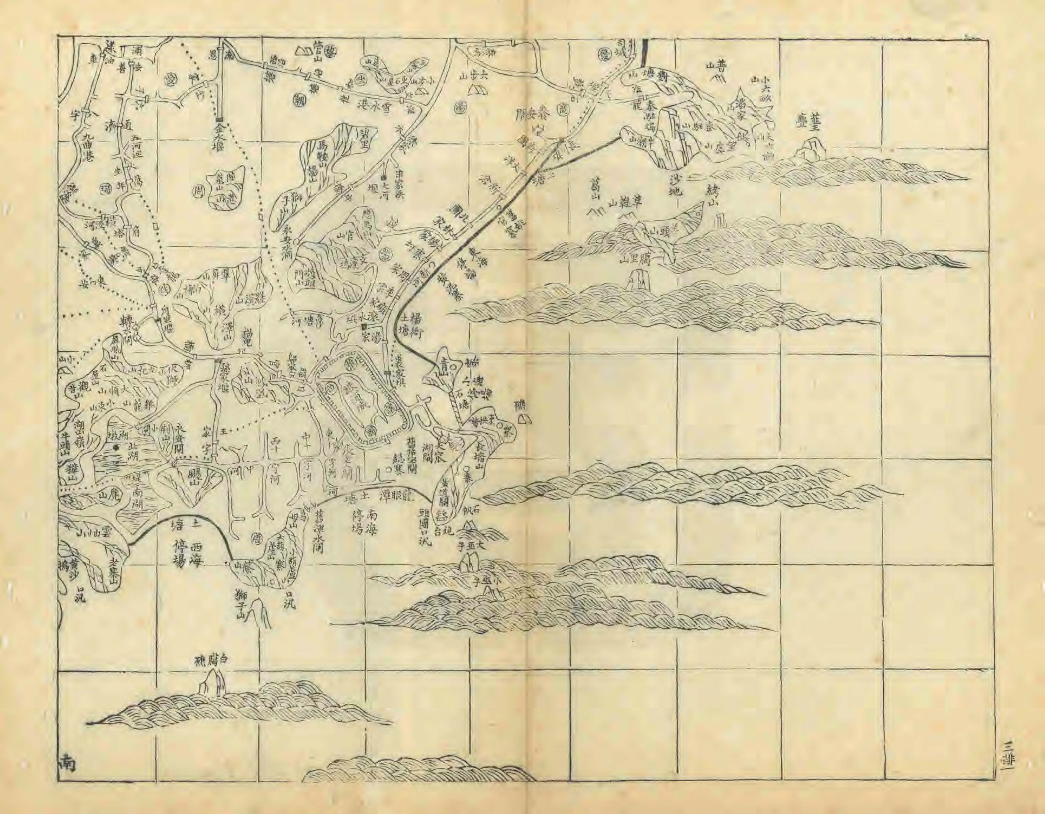 清光绪三年（1877）《光绪海盐县志》县境分图之六，示澉浦所城及周边地区。